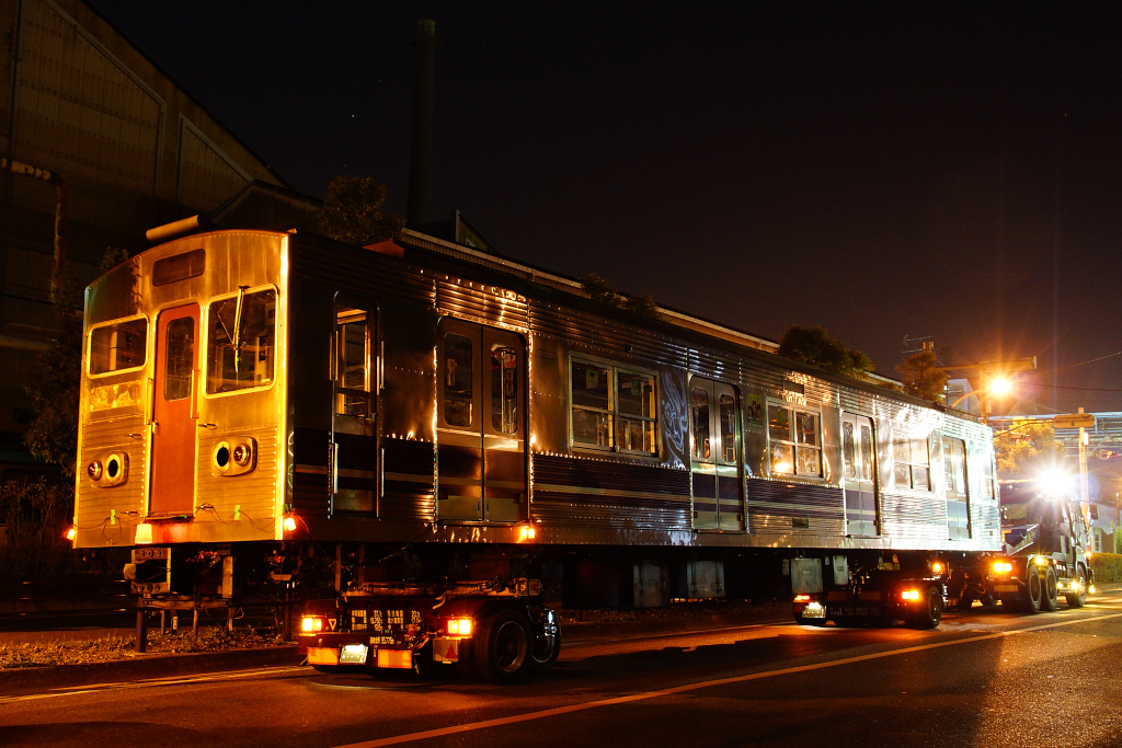 廃車に伴ってトレーラーで搬出される30系ステンレス車です。撮影者:Series207(